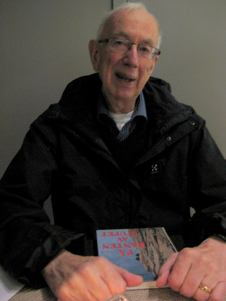 Forfatter 2013